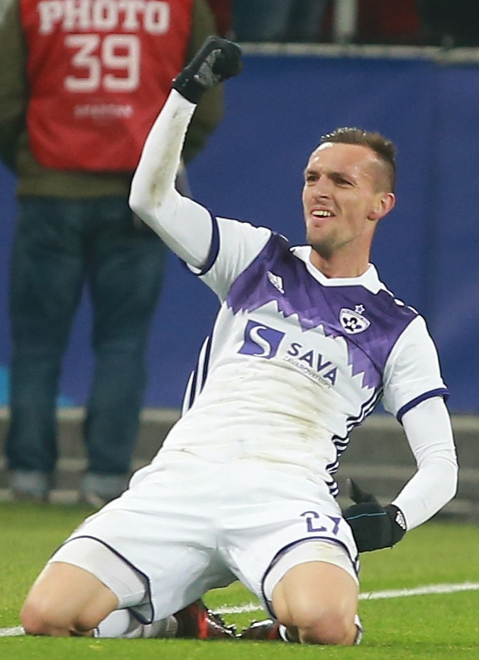 Jasmin Mešanović